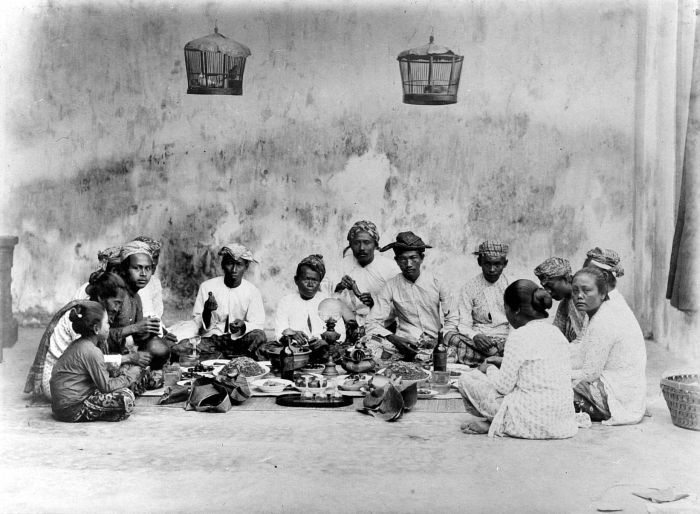 Repronegatief. De religieuze maaltijd 'selamatan', Java